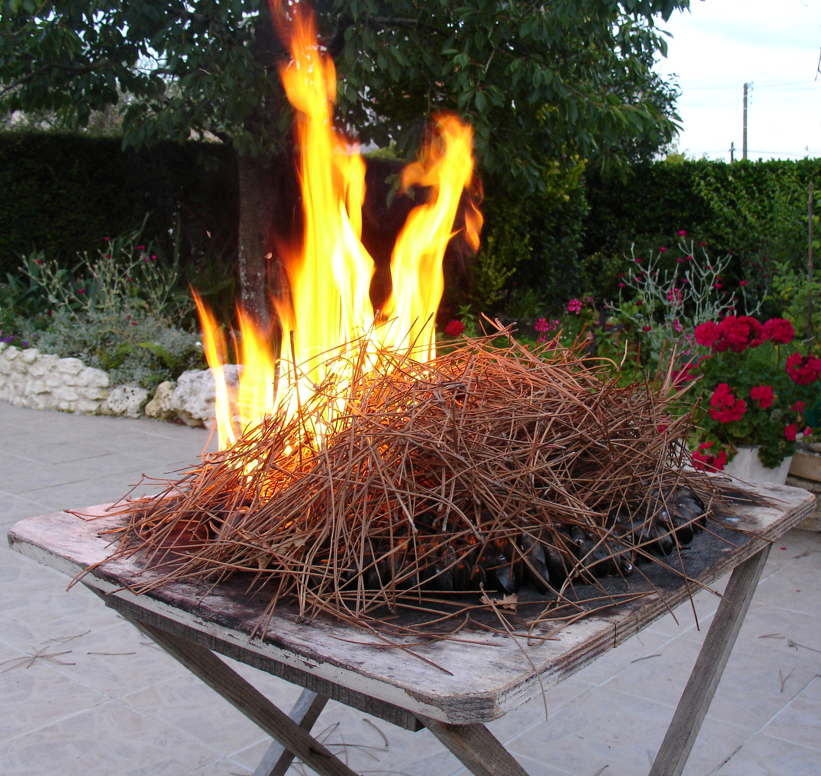 Cuisson de l'éclade aux aiguilles de pin